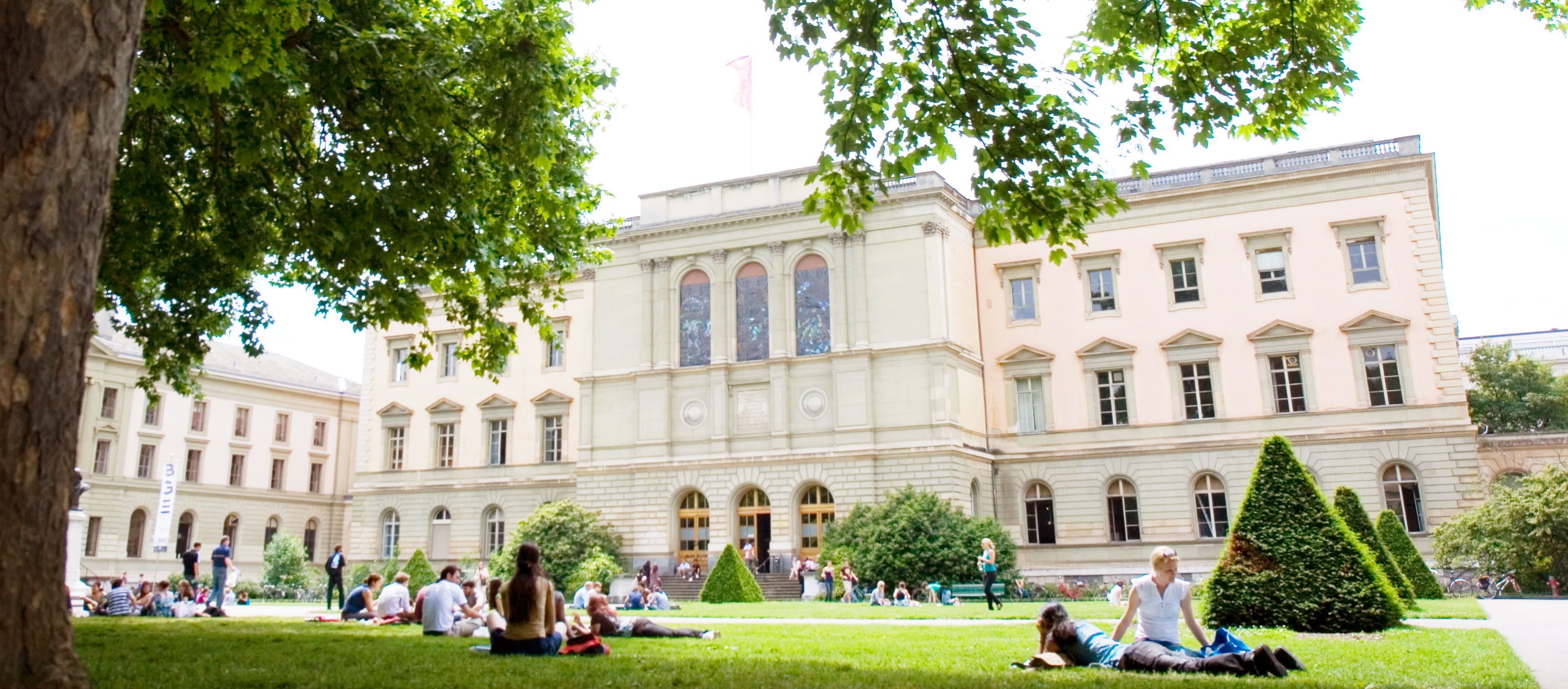 Vue d'UNI Bastions: bâtiment qui abrite les Facultés des lettres et de théologie.